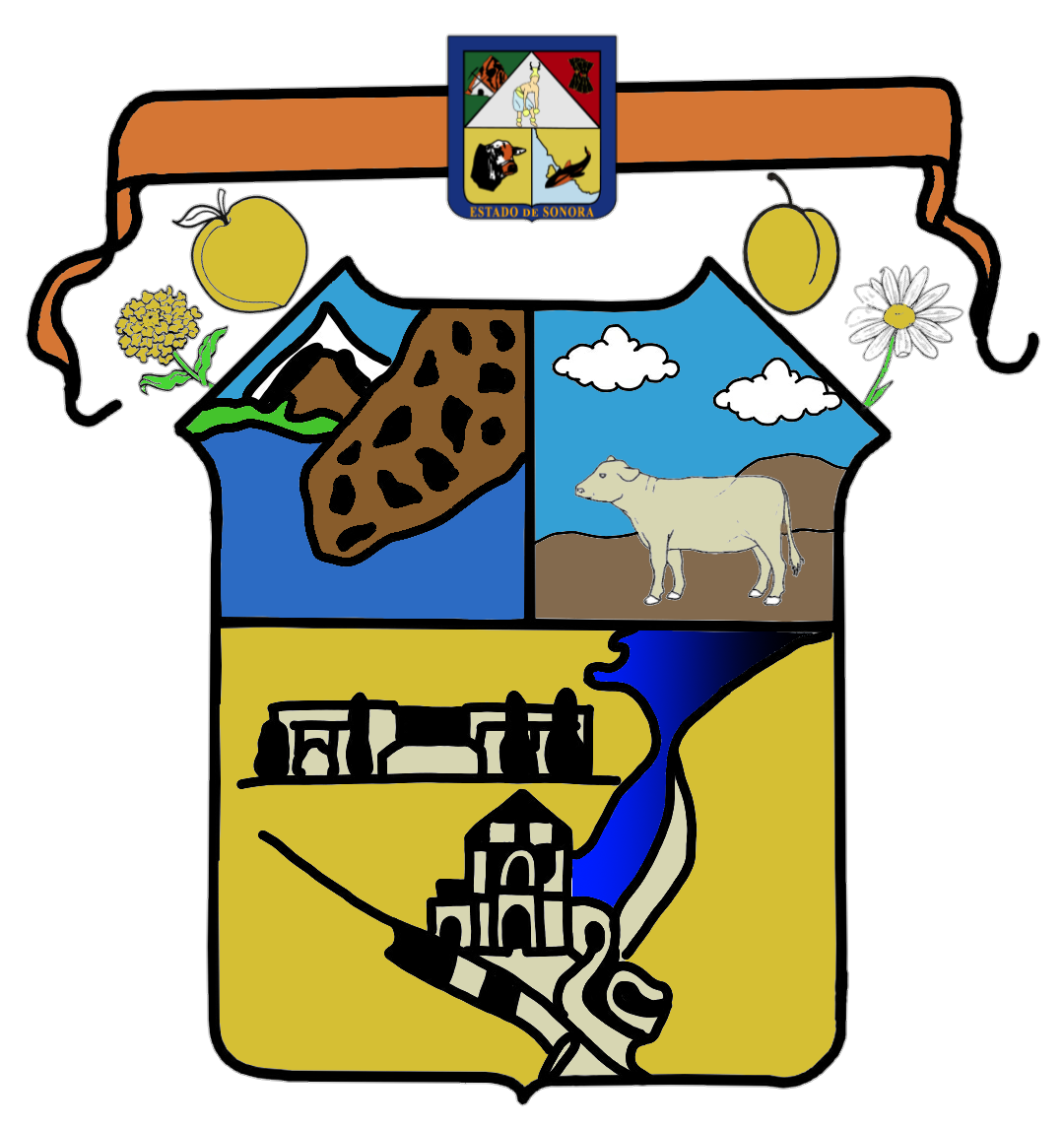 Escudo del municipio sonorense.